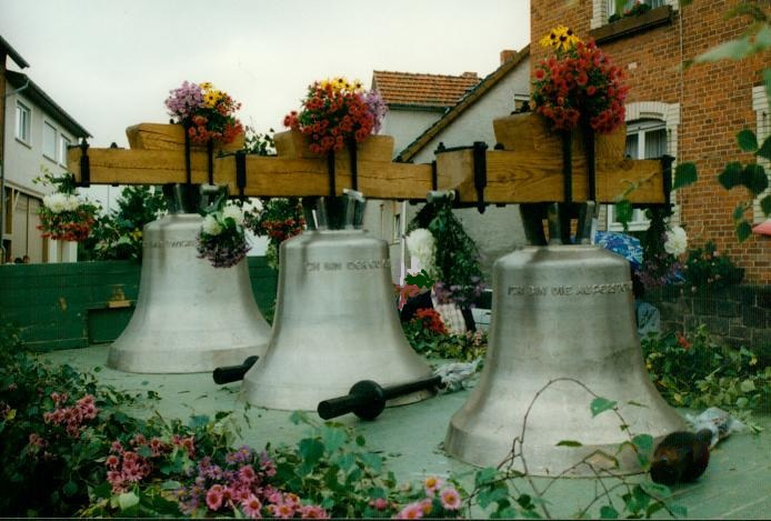 Evangelische Kirche Birklar